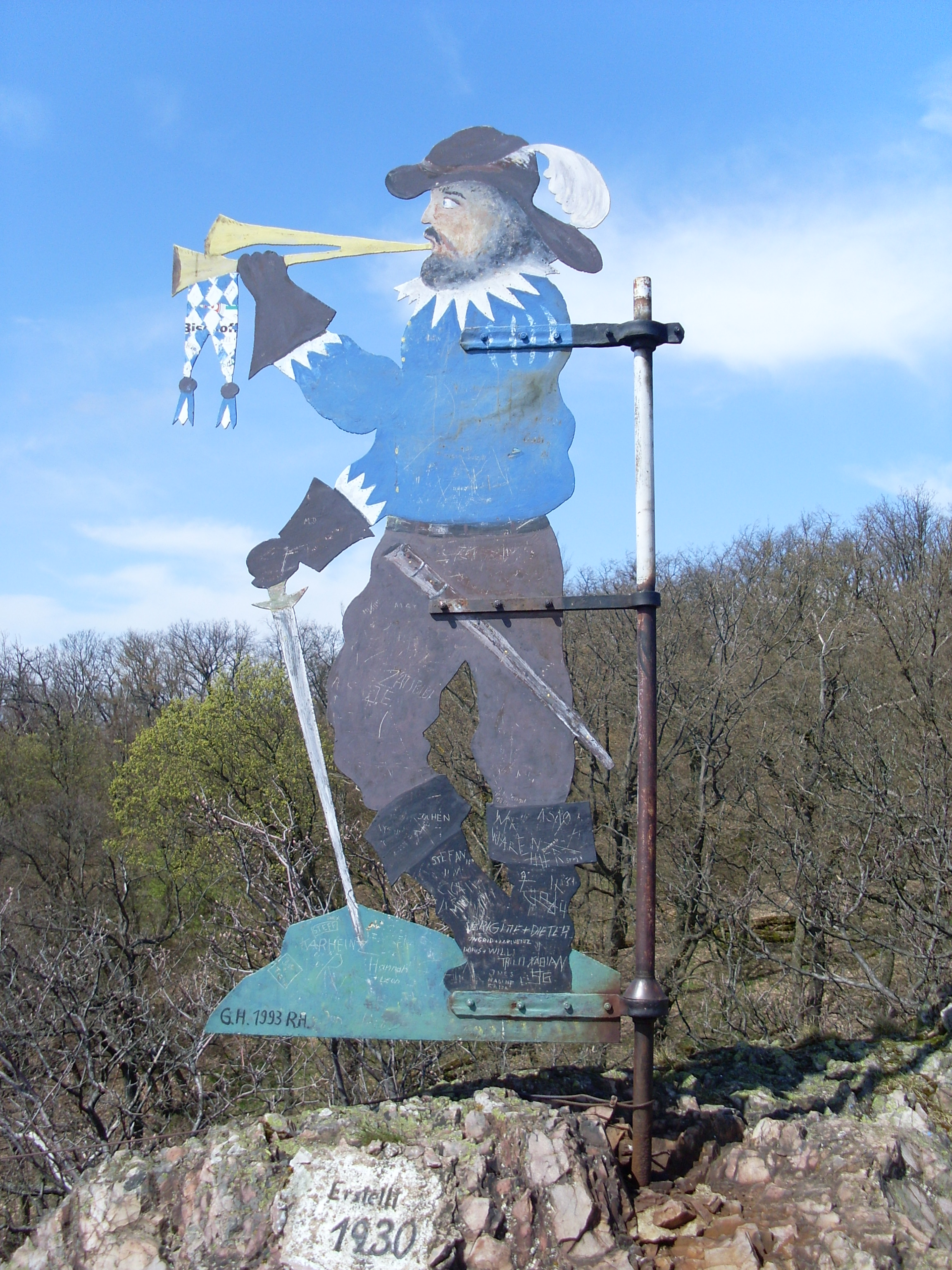 Eiserner Mann auf dem Beutelfels